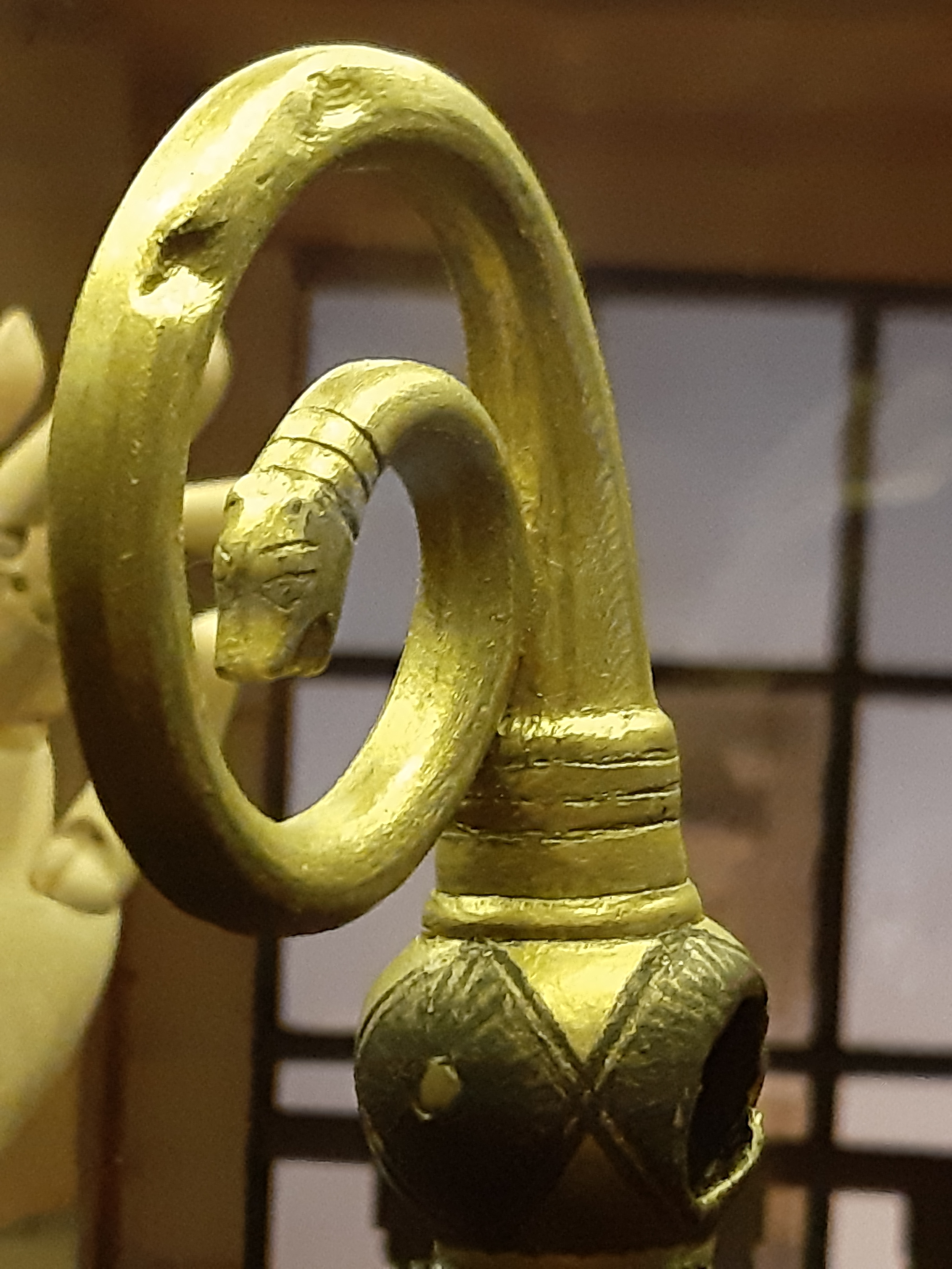 Reprodución do báculo do bispo Gonzalo de Mondoñedo no museo parroquial de San Martiño de Mondoñedo.